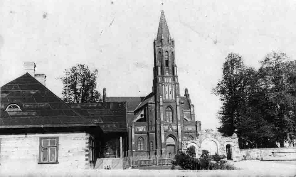 Беларуская (тарашкевіца): Шылавічы (Šyłavičy). Касьцёл